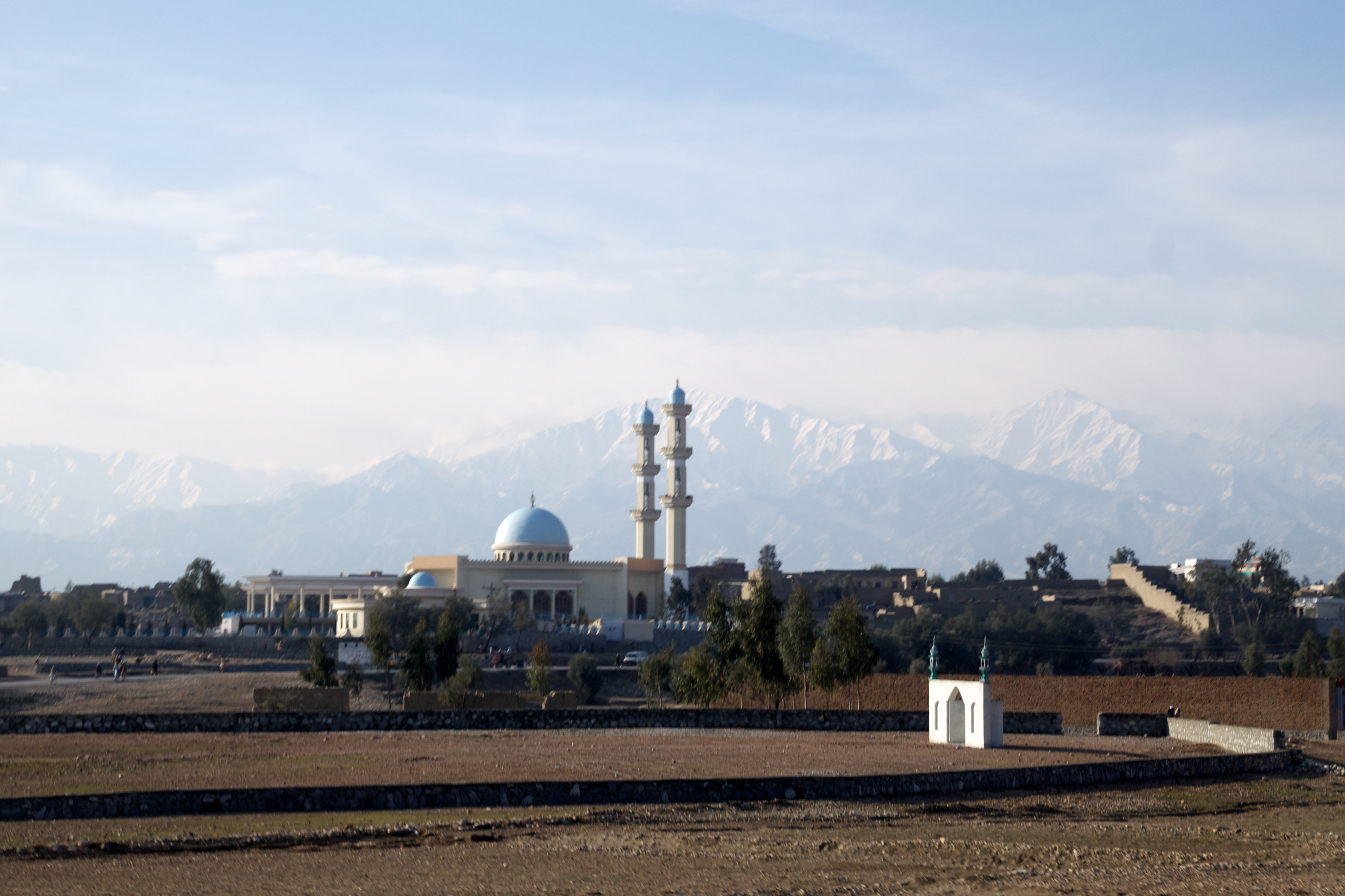 Jalalabad minarets.